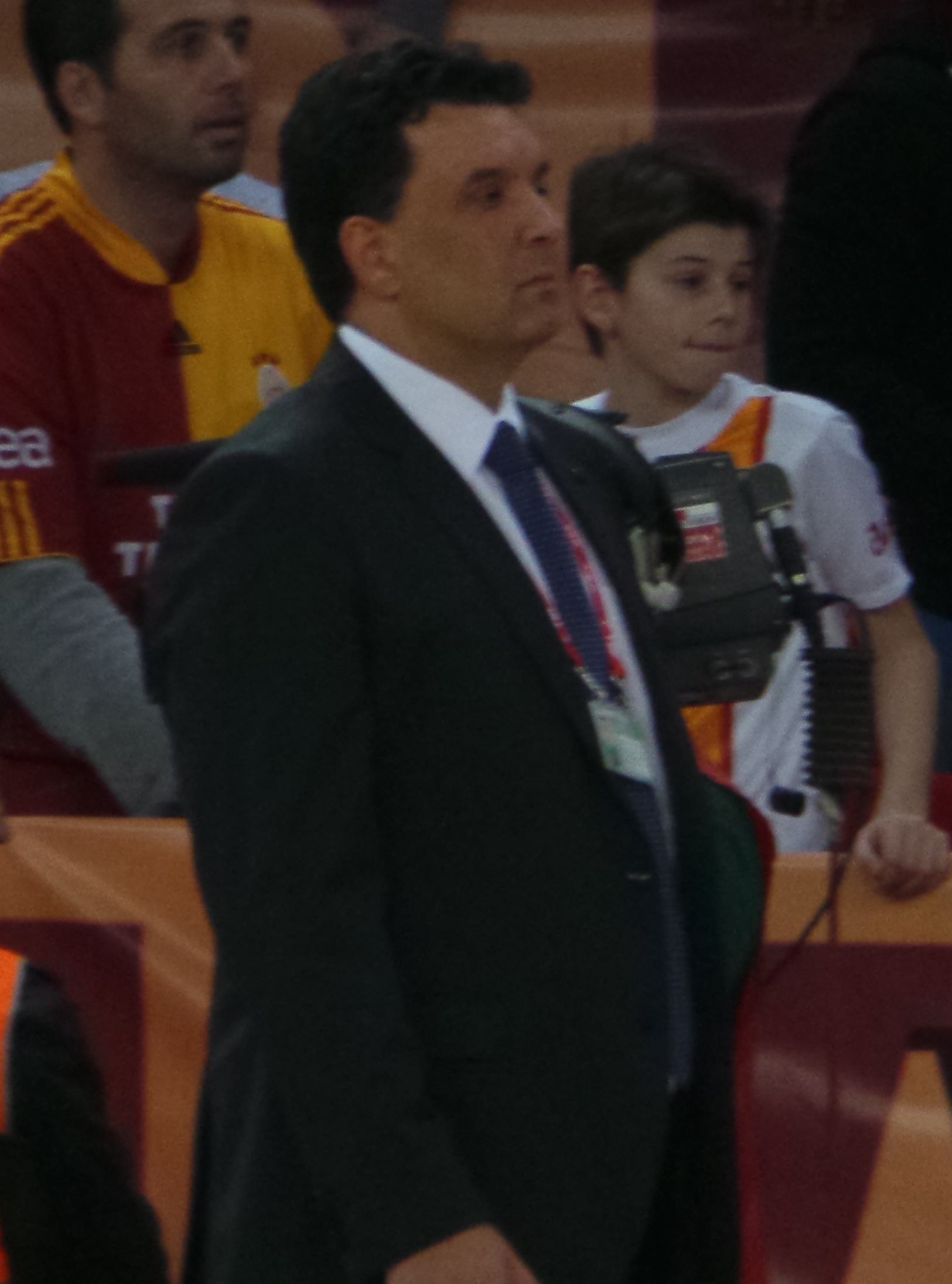 Vangelis Angelou